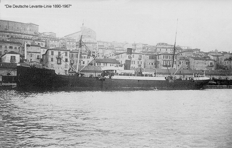 Der Dampfer ATHOS der Deutschen Levante Linie, zuvor Marxburg der DDG Hansa